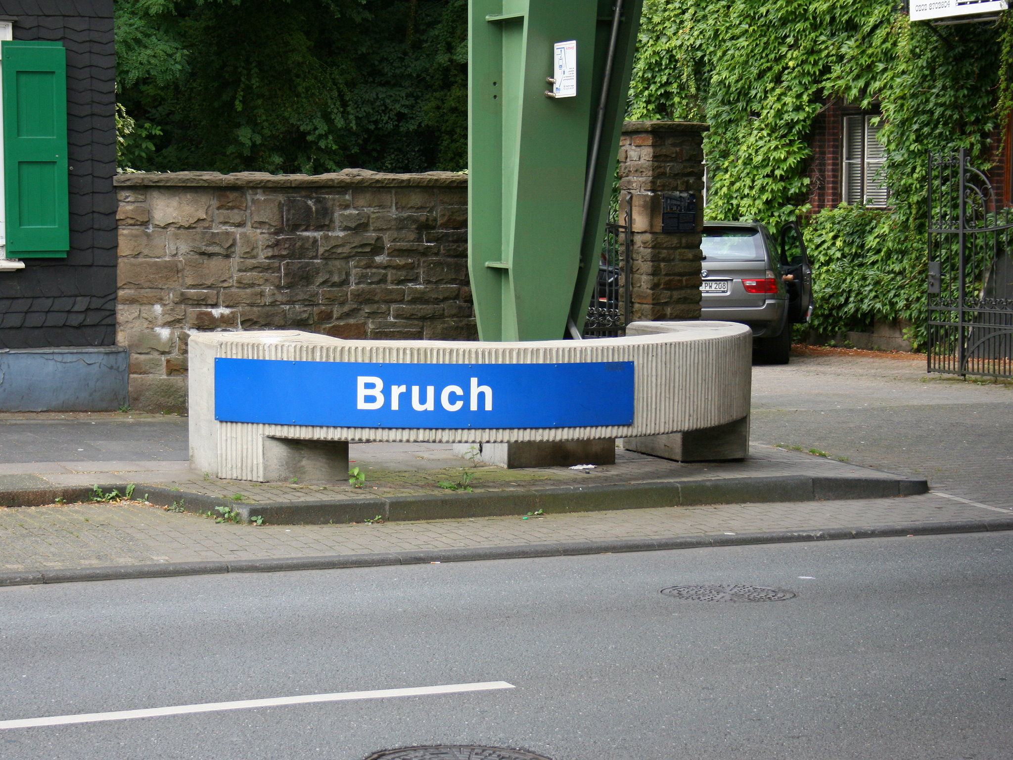 Schwebebahnstation Bruch